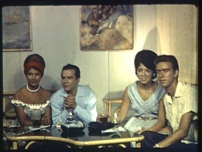 Fotograma de los protagonistas, asistiendo a una actuación de la cantante Fabiana, en la película Isla de Ensueño